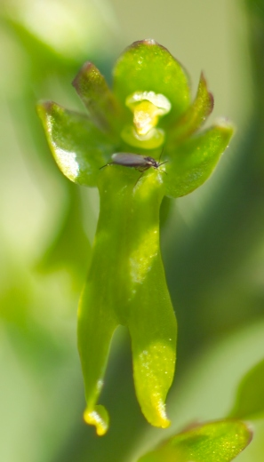 Listera ovata à Dieppe